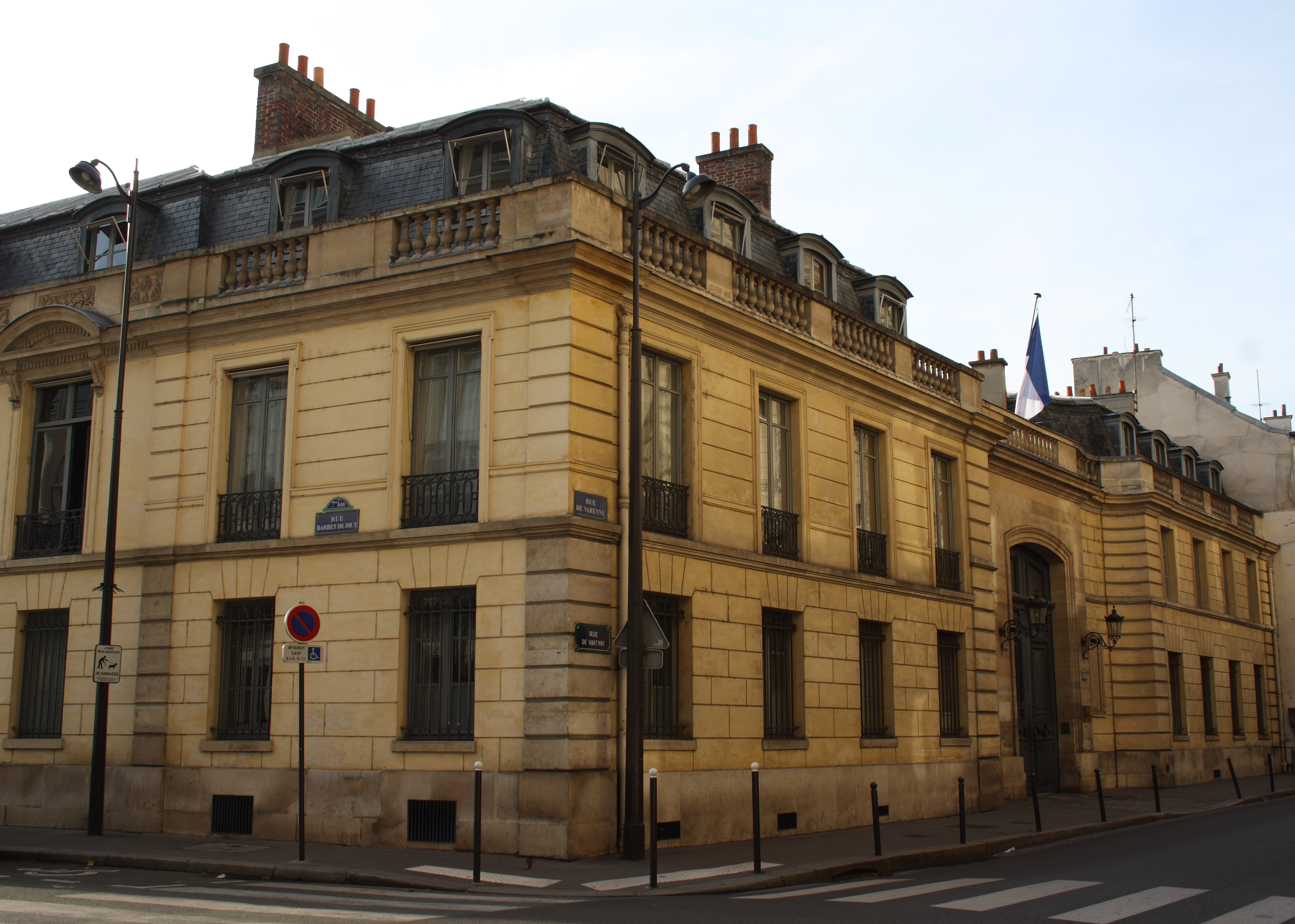 Hôtel de Clermont in Paris (7. Arrondissement), 69 rue de Varenne/6, 8 rue Barbet-de-Jouy